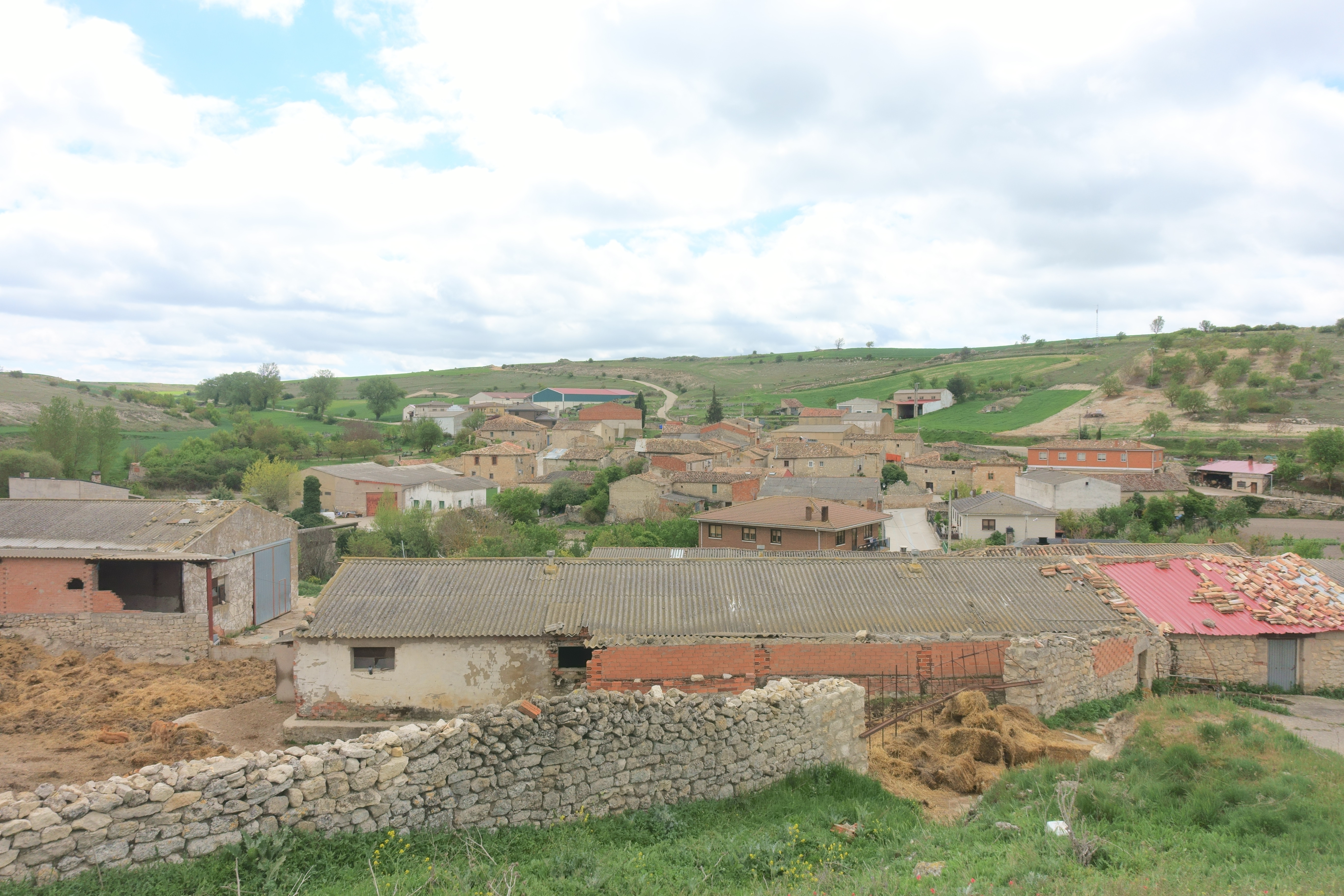 Vista general de Castellanos de Castro (Burgos, España).